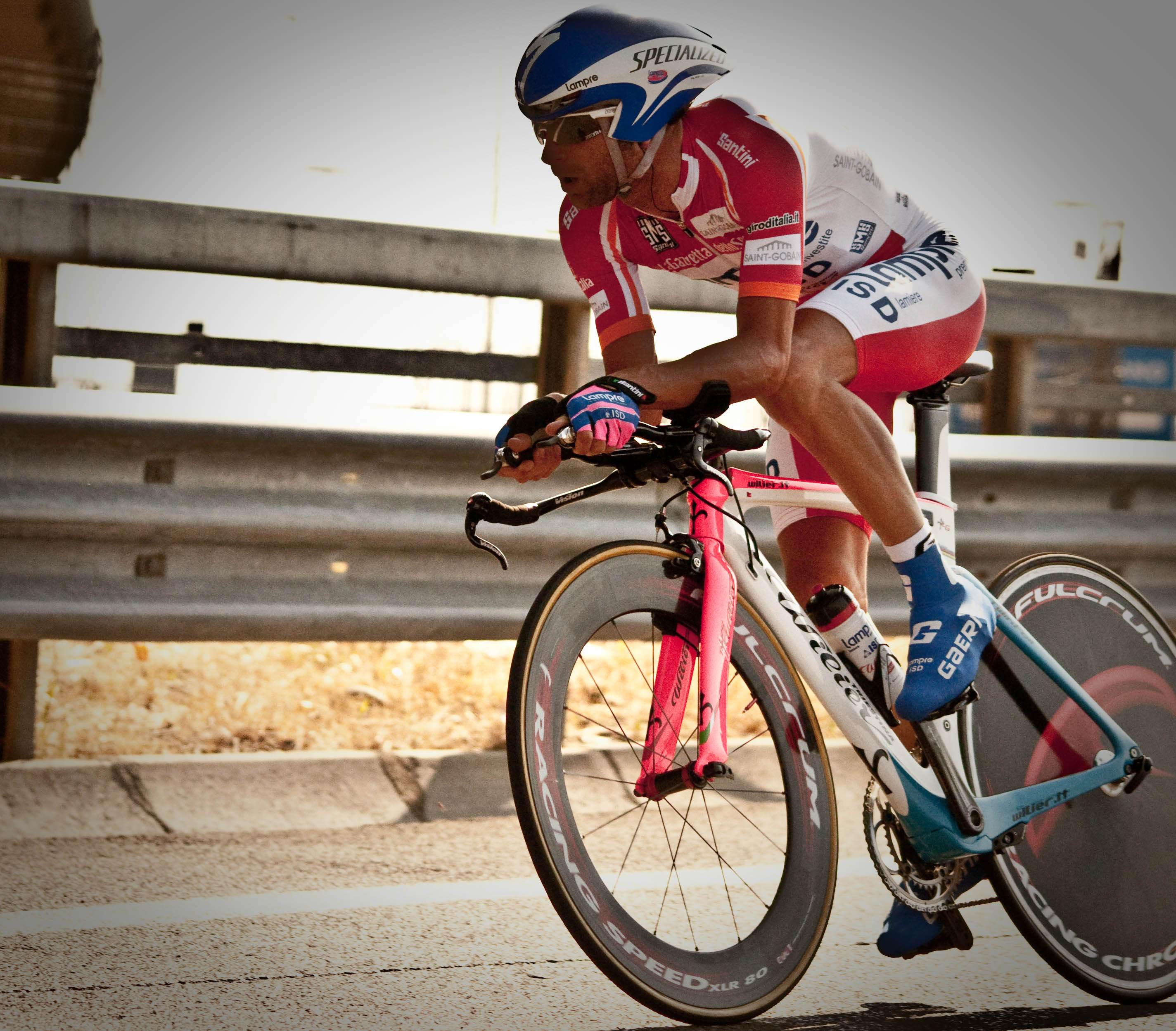 Scarponi (1 di 1)-2